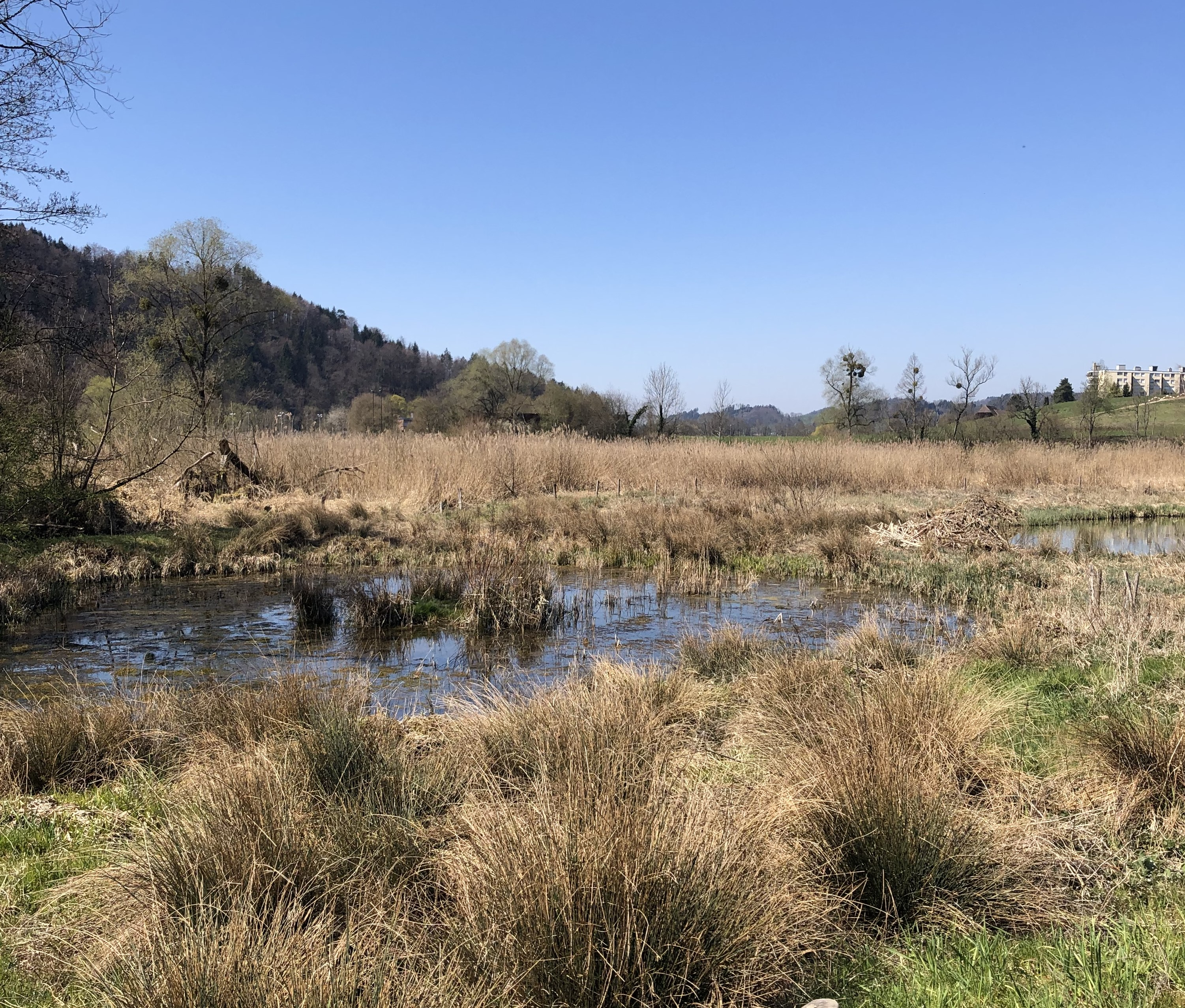 Eymatt Delta Gäbelbach bei Aarezufluss